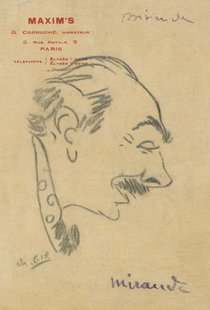 Yves Mirande : caricature